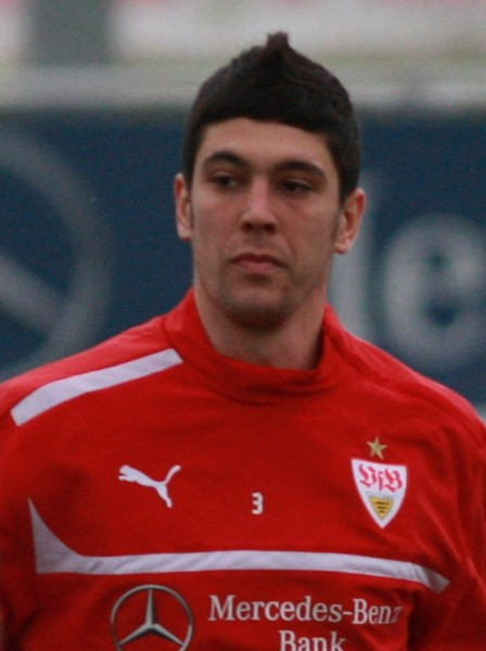 Felipe Lopes bei seinem ersten VfB-Training. Aufgenommen von